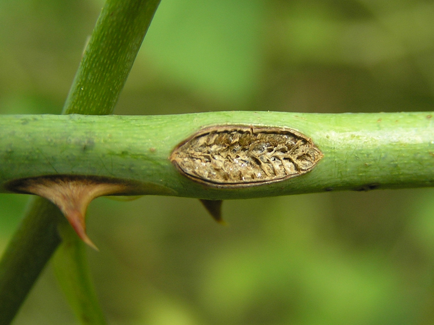 Arge pagana, Brok, Polska